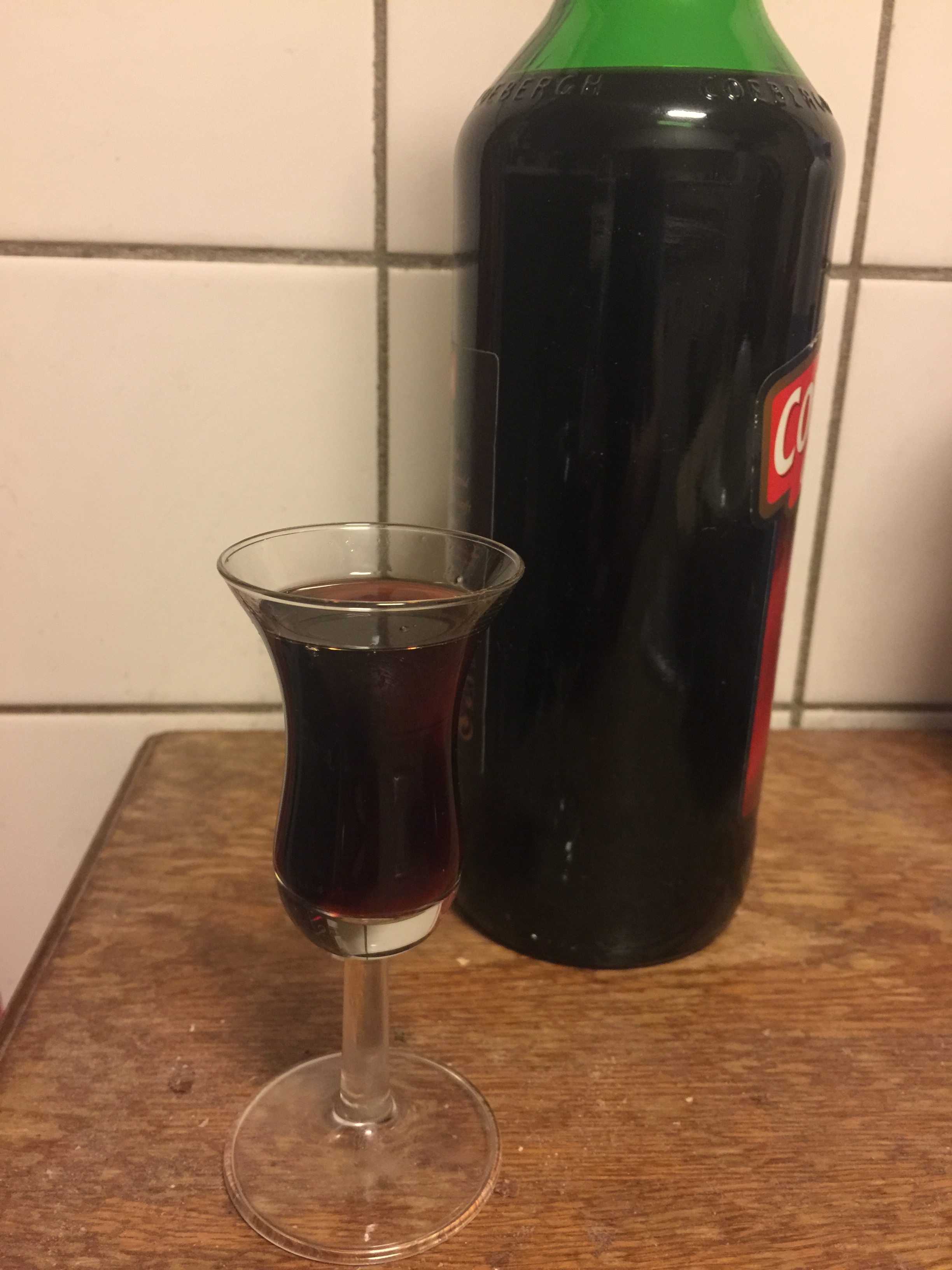 Coebergh Classic bessenjenever, 2010